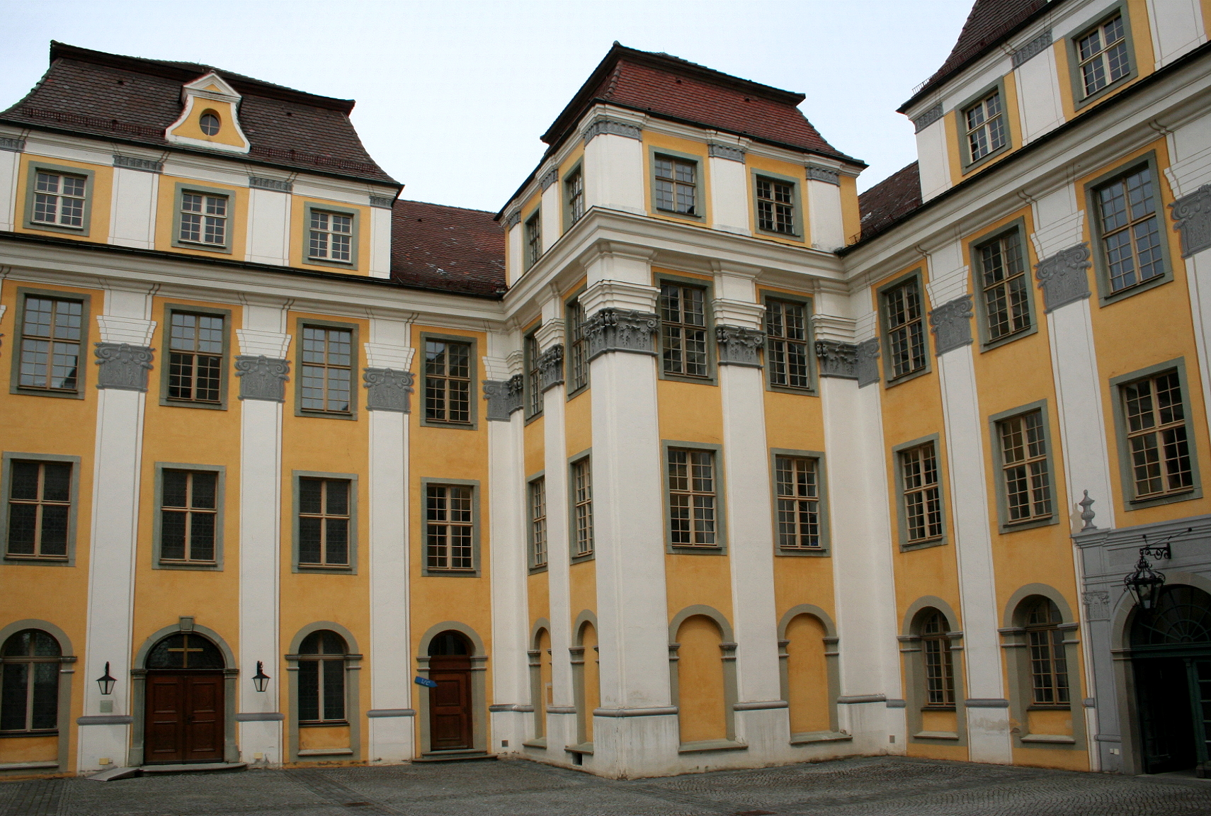 Amtsgericht Tettnang in Tettnang, Neues Schloss (2. Stock), links unten der Eingang zur Ev. Schlosskirche